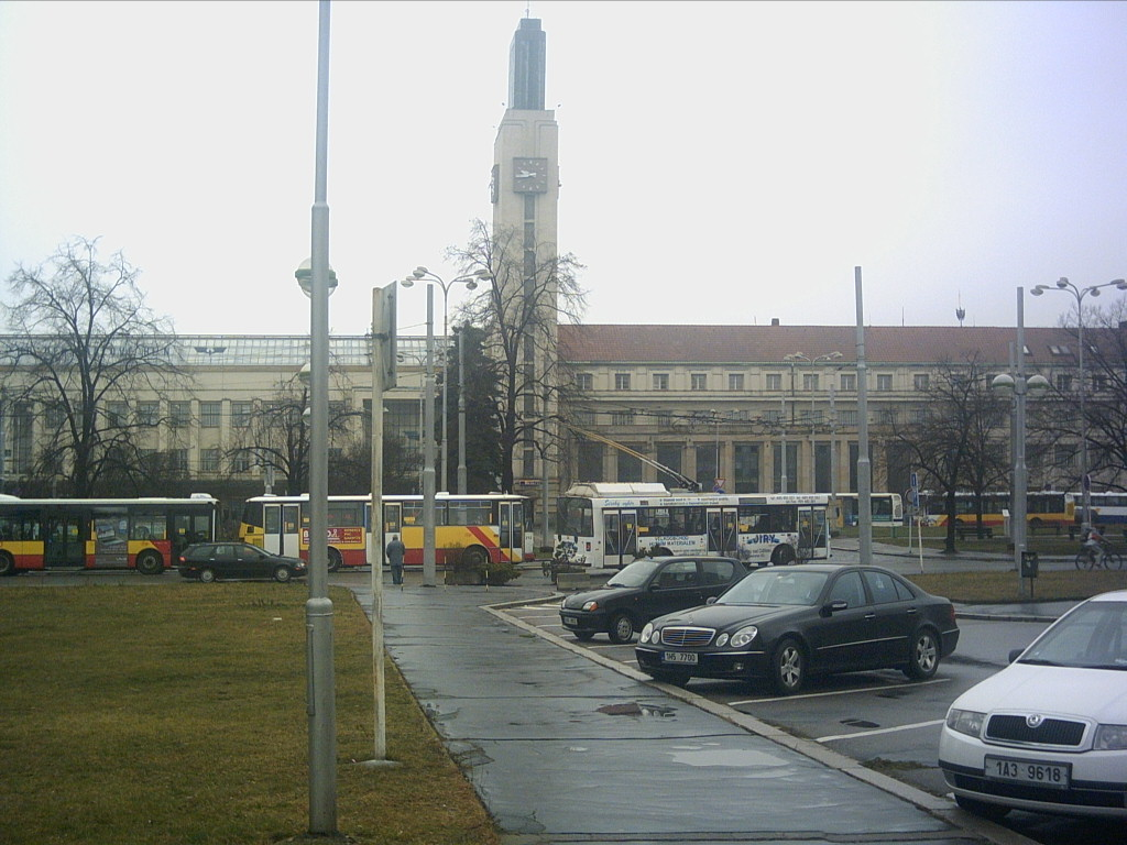 Riegrovo náměstí z pohledu od Amber Hotel Černigov